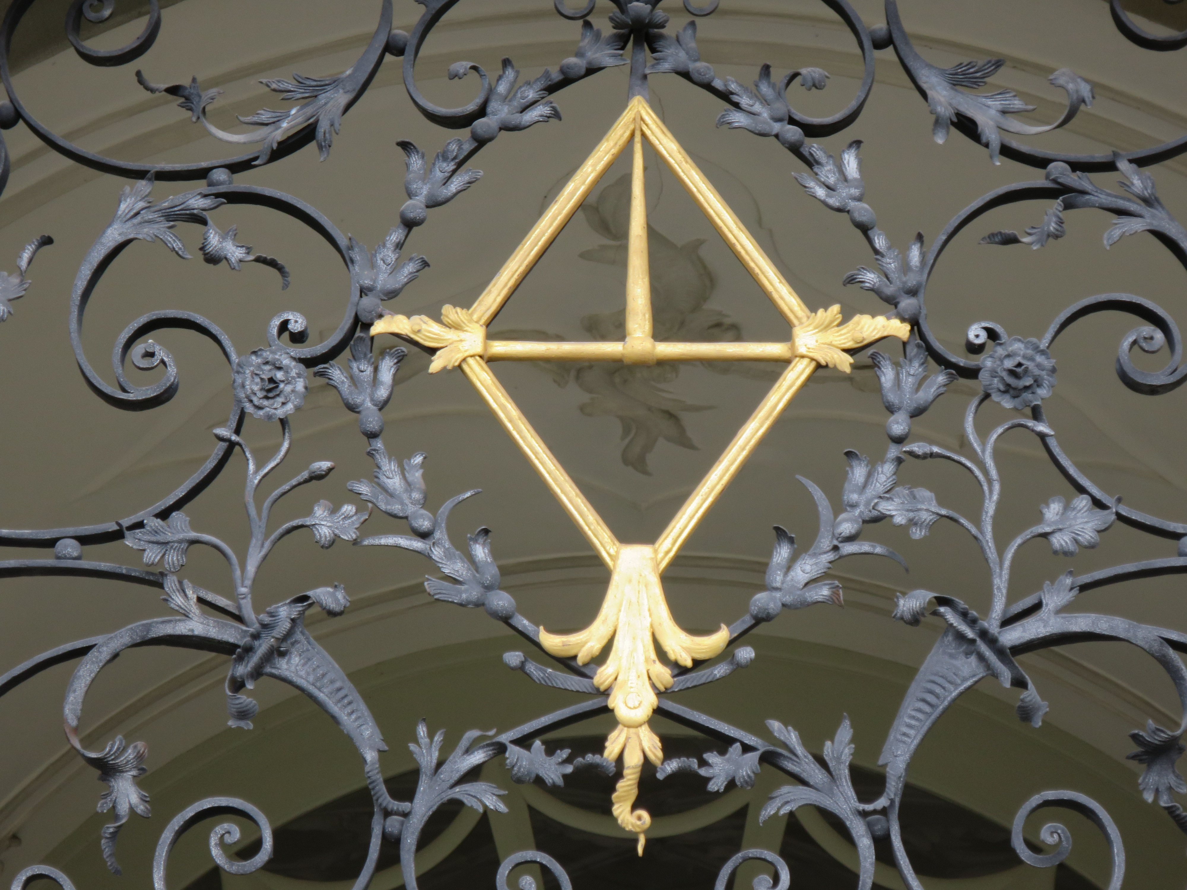 Reformierte Kirche Wädenswil - Stadtwappen am Turmportal